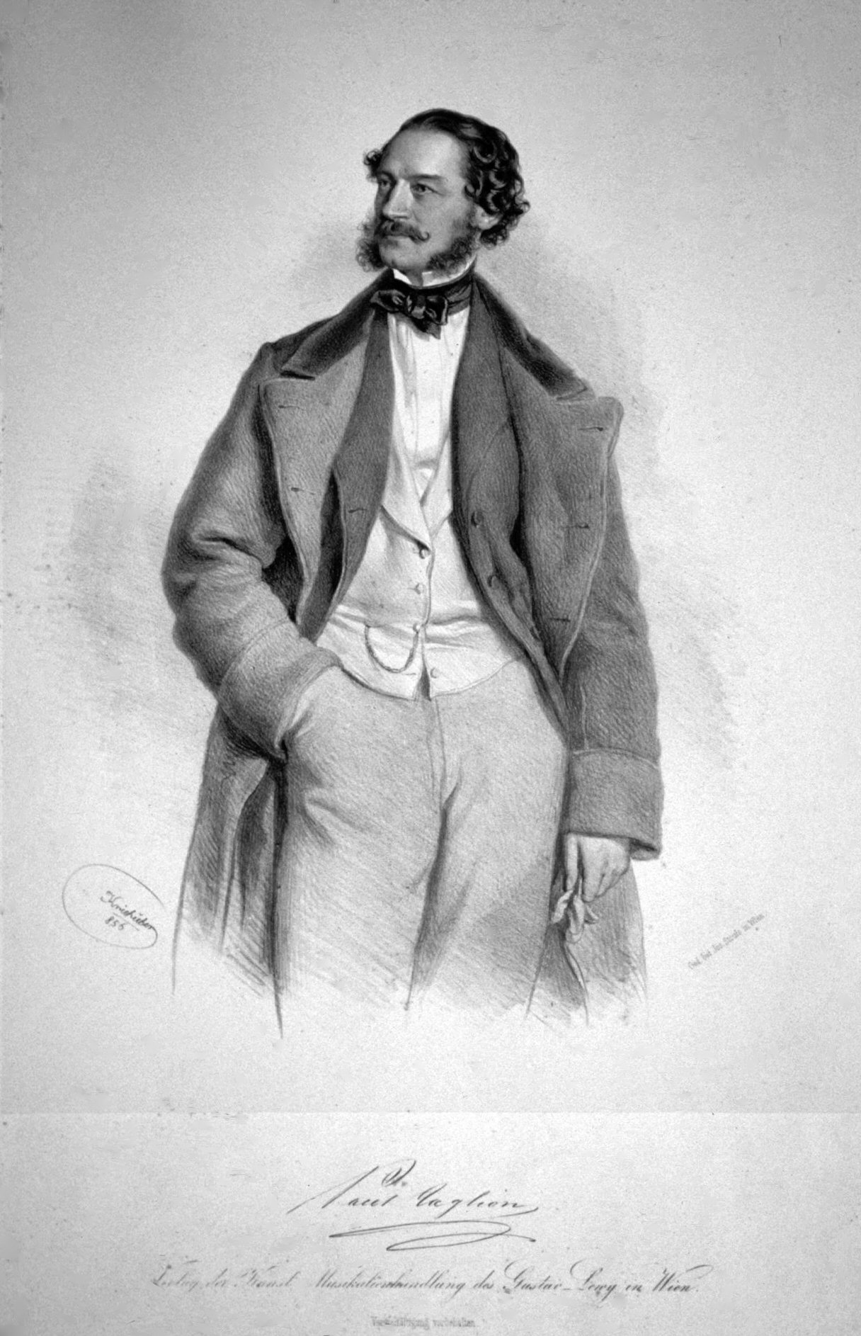 Paul Taglioni (1808-1884), italienischer Tänzer, Choreograph, Ballettmeister. Brufer von Maria Taglioni d. Ä. Lithographie von Josef Kriehuber, 1856